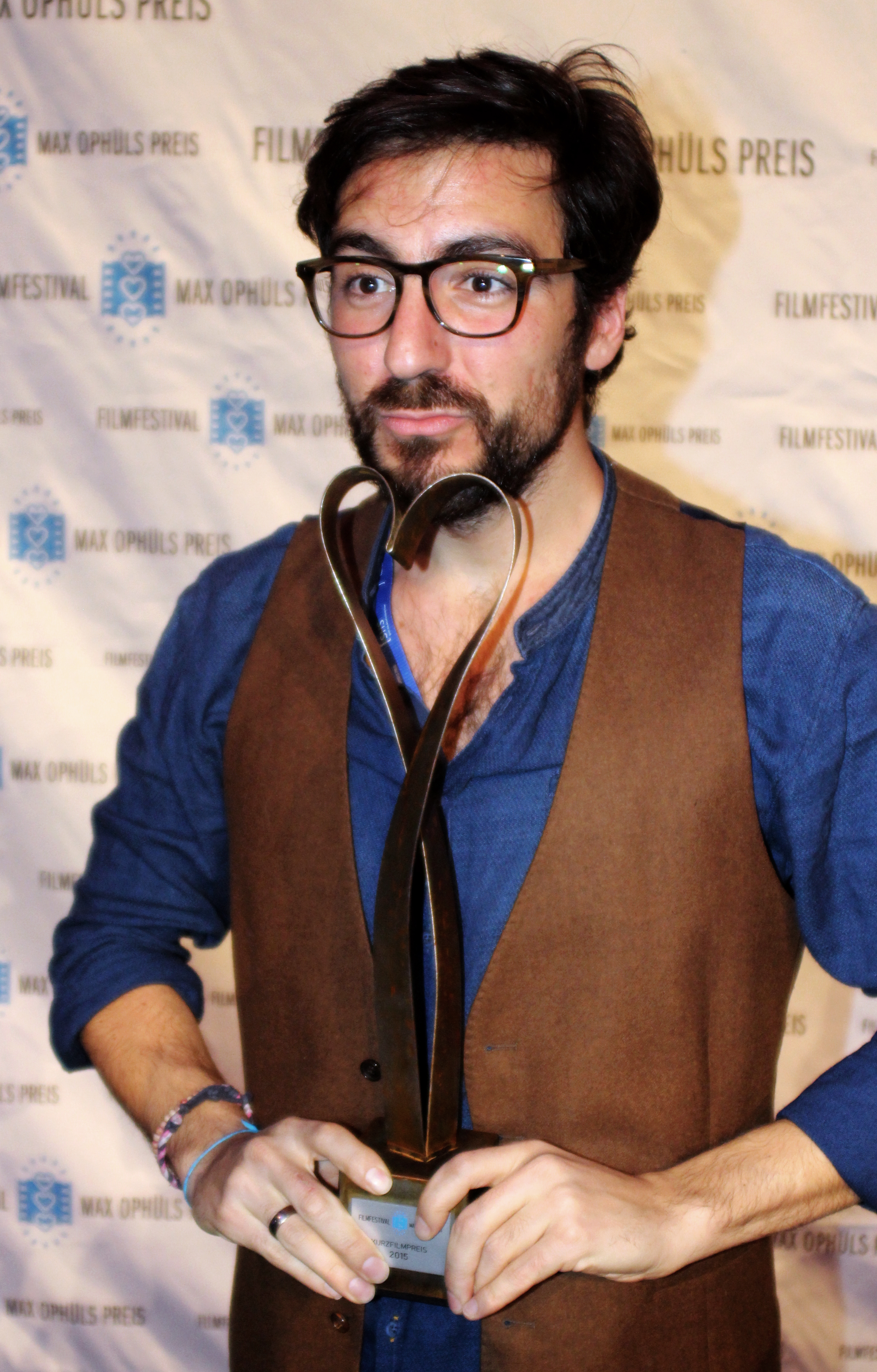 Ilker Çatak nach der Preisverleihung beim Max-Ophüls-Preis 2015